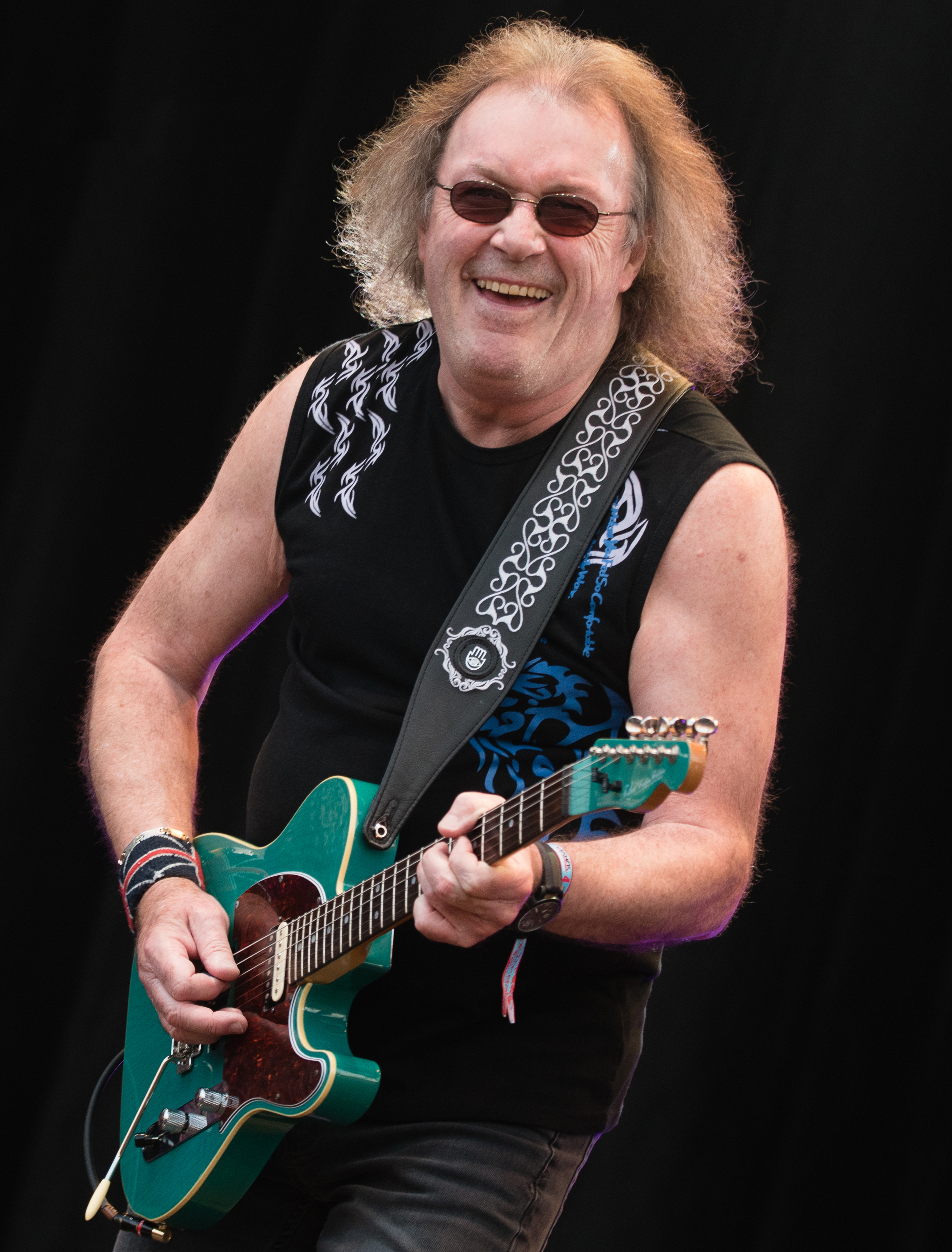 Geoff Whitehorn live beim Werner Rennen 2018